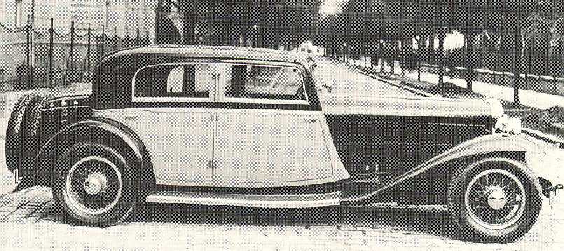 Gräf & Stift SP 8 Saloon 4 doors (1933)